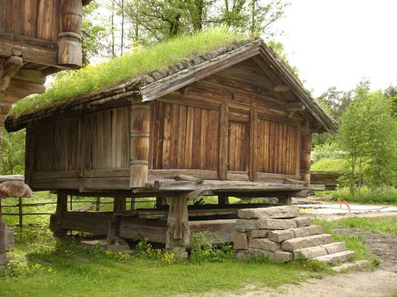 Bur fra Nedre Nisi i Gransherad, bygd i 1797 og flyttet til Norsk Folkemuseum i 1943.